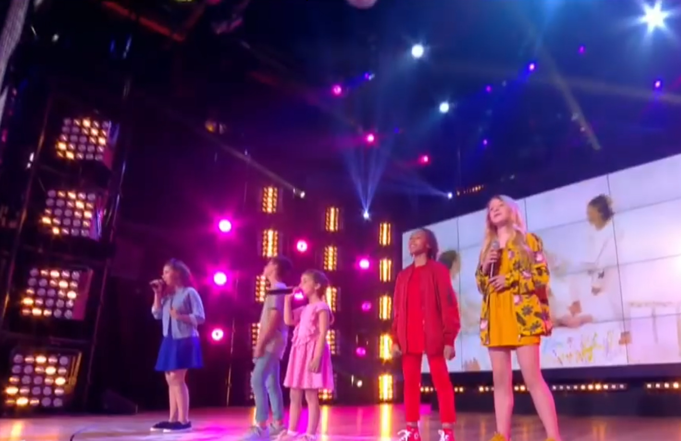 Les kids united sur scène pour l’émission [ [ Touche pas à mon poste ] ] à [ [ Canal Factory ] ] .